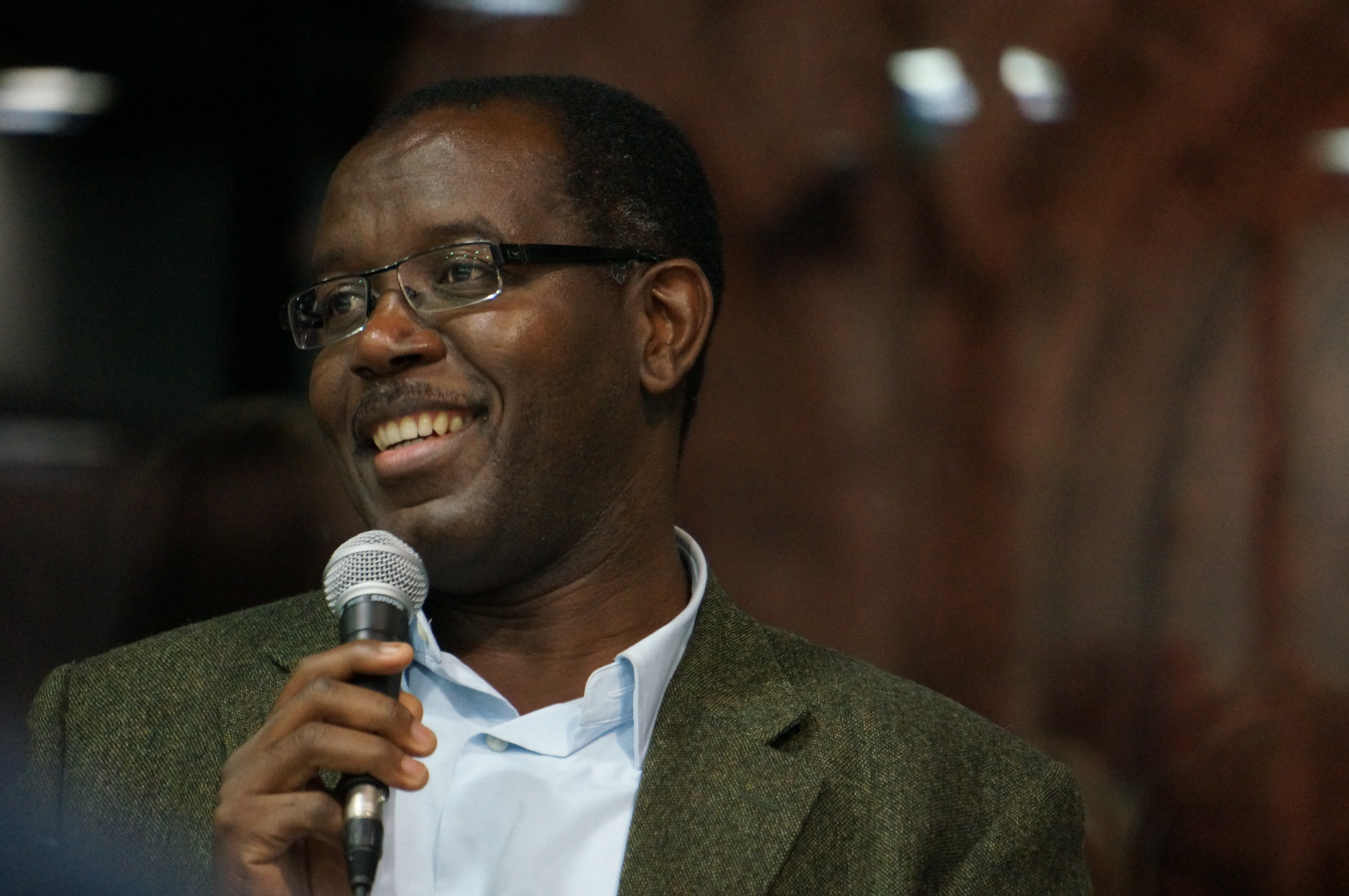 Louis-Philippe Dalembert parlant de poésie.